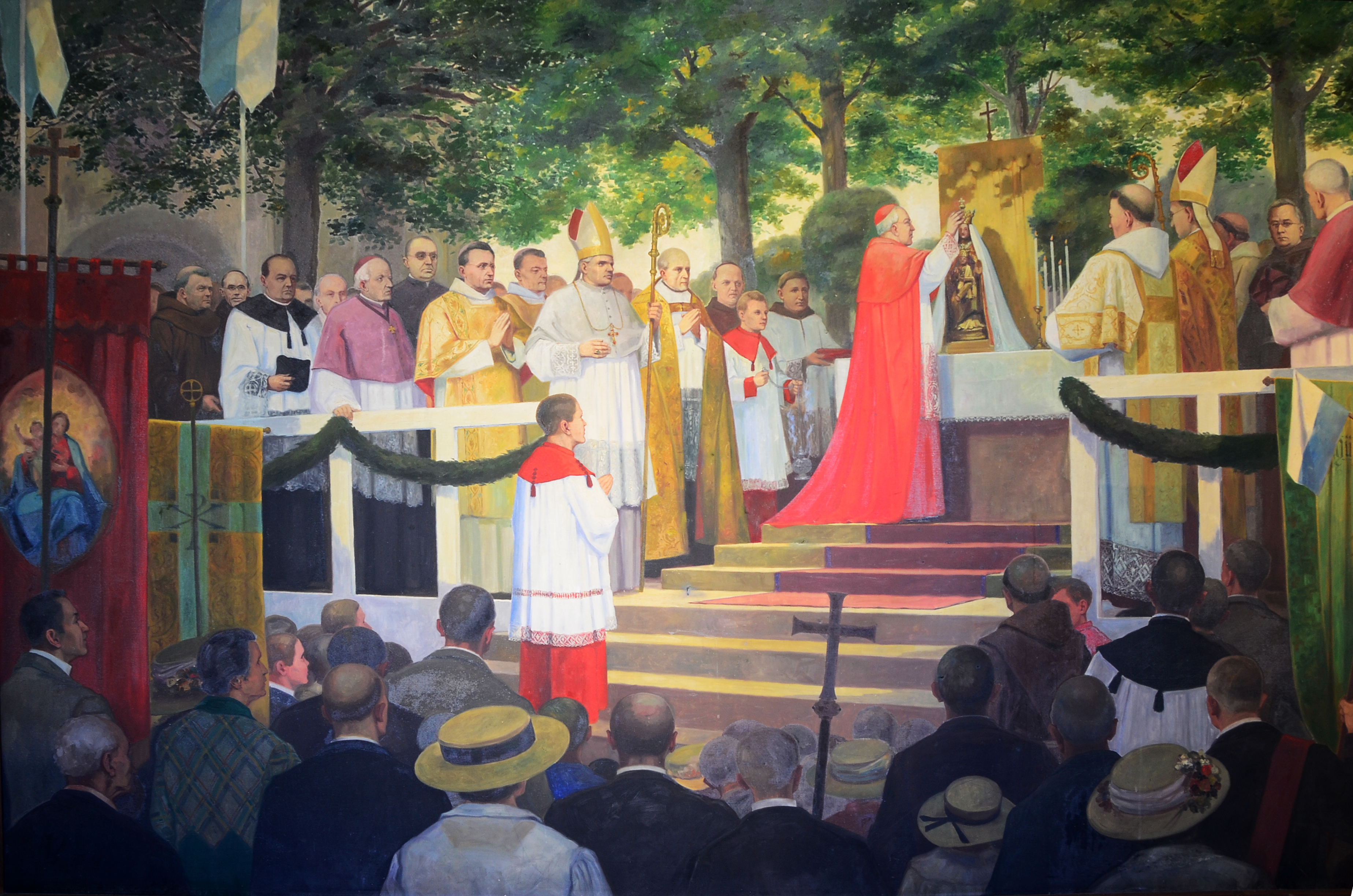 Den Höhepunkt der 250 Jahrfeier am 13. August 1911 stellte die Krönung des Gnadenbildes dar. 50 000 Pilger fanden sich zu diesem Anlass in Werl ein. Die Krönung nahm Kardinal Antonius Fischer unter der Assistenz von Diözesanbischof Karl Joseph Schulte von Paderborn vor. Die Festpredigt hielt der Franziskanerbischof Bernhard Döbbing.